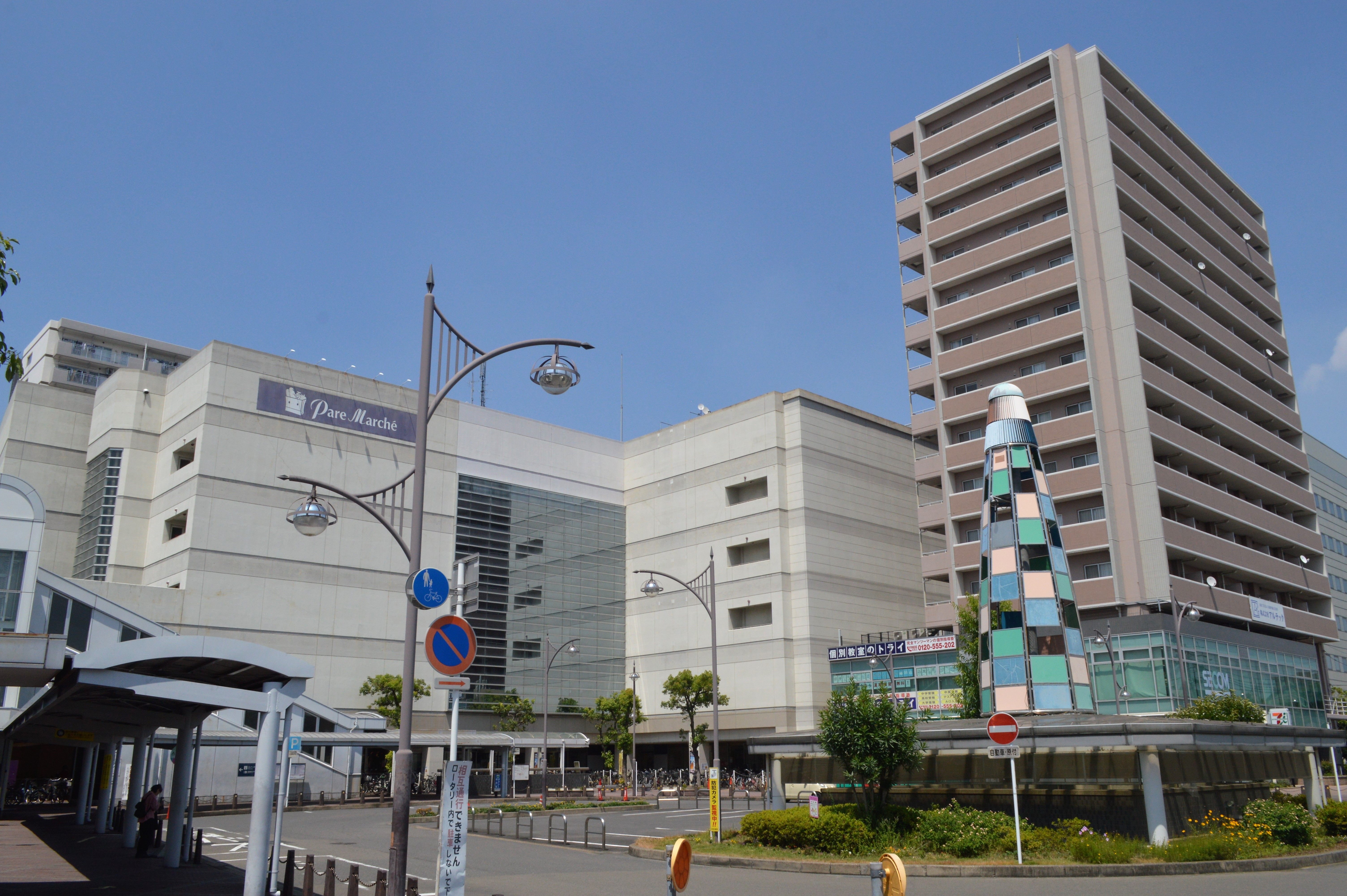 愛知県北名古屋市。名鉄犬山線西春駅東口。